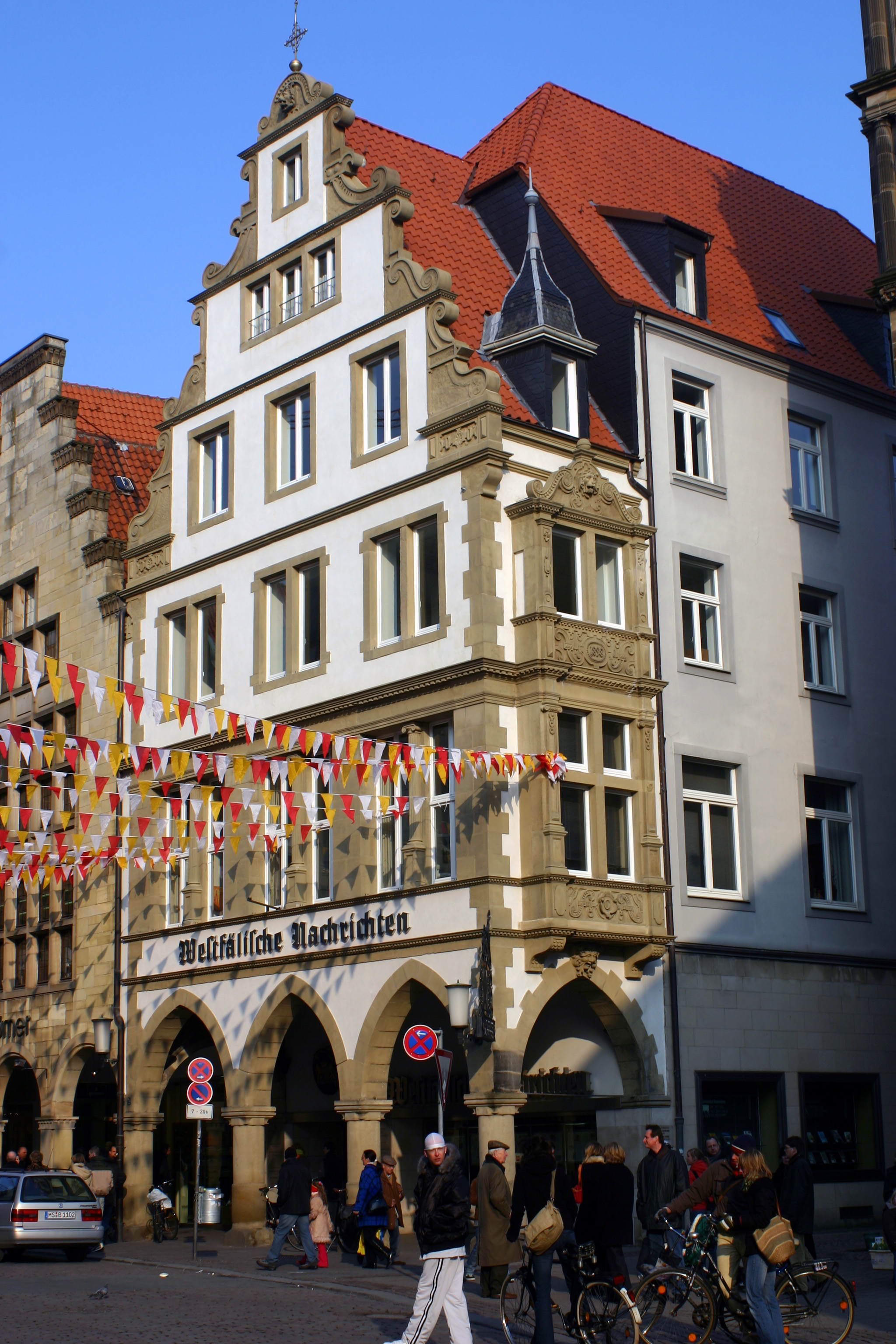 Münster, Prinzipalmarkt 13